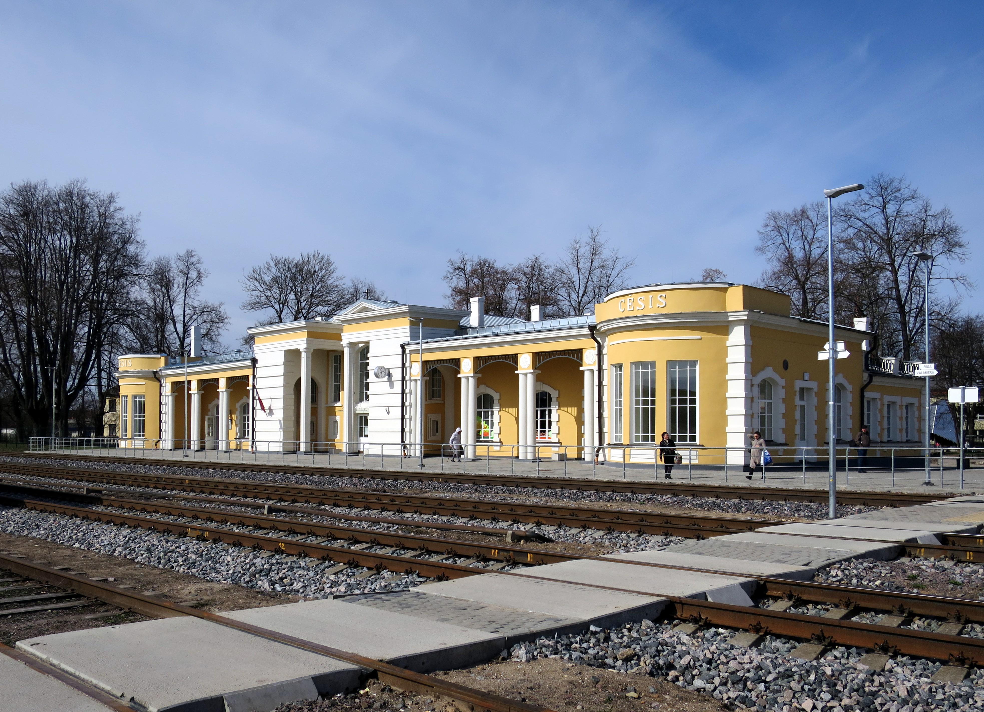 Cēsu stacijas ēka